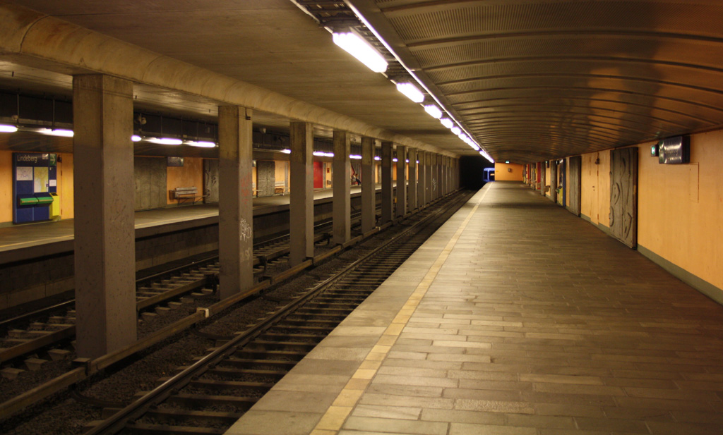 Lindeberg T-banestasjon fra plattformen mot Furuset T-banestasjon.